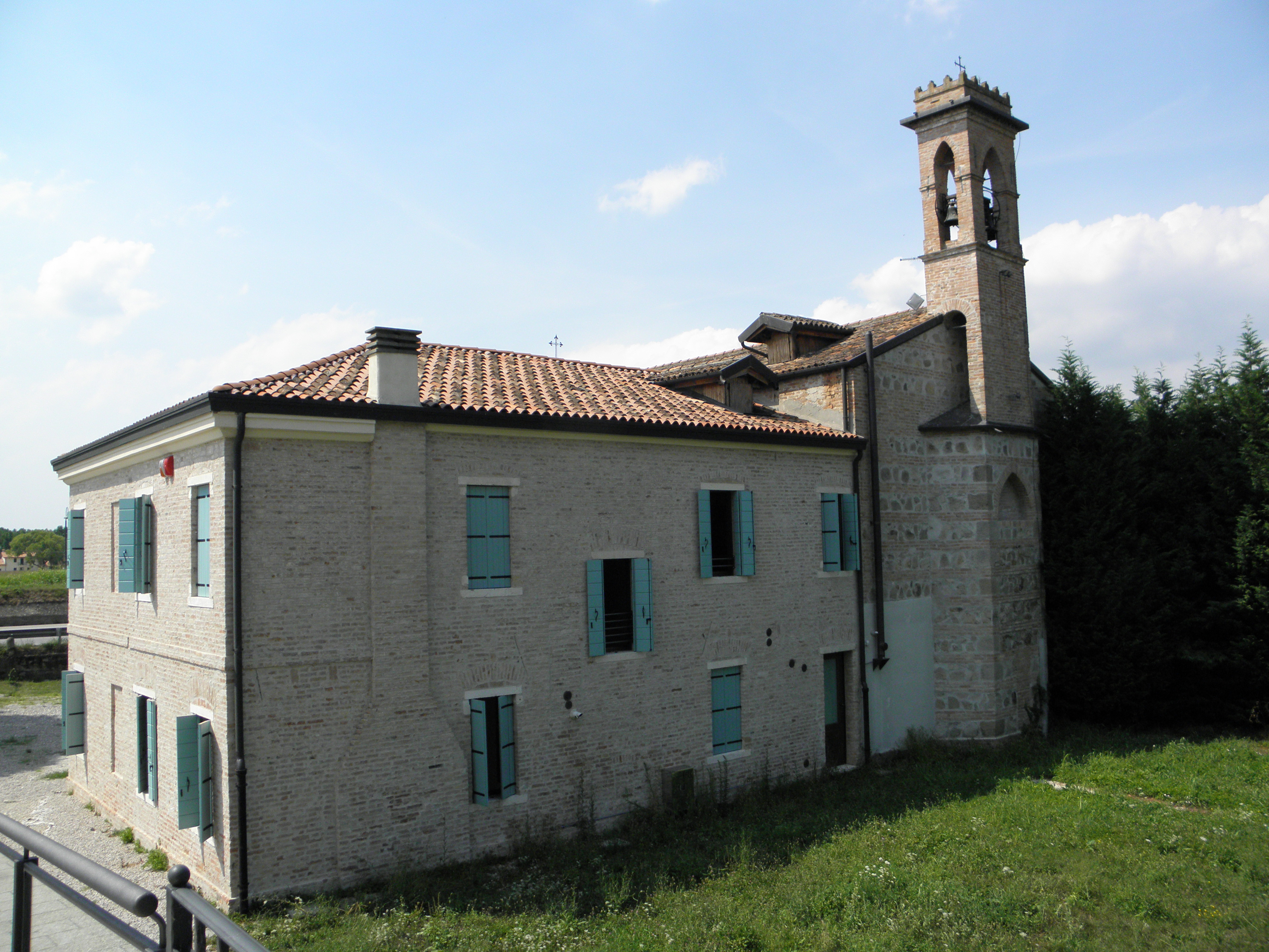 Mandriola, frazione di Albignasego: vista posteriore del complesso cui fa parte la precedente chiesa di San Giovanni apostolo ora sconsacrata e ridesignata sala don Lorenzo Milani.